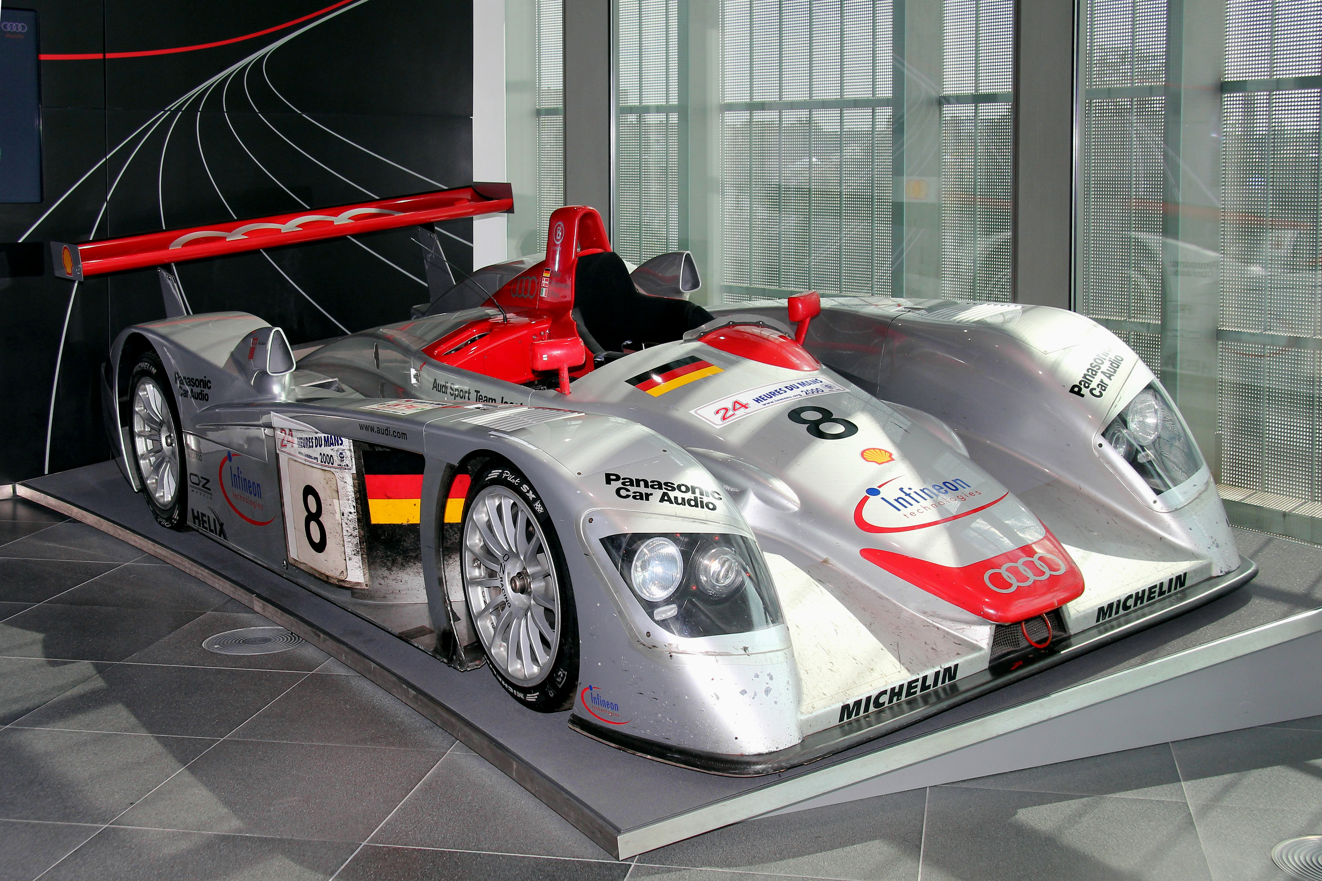 Audi R8 LMP im museum mobile in Ingolstadt. Le-Mans-Sieger 2000